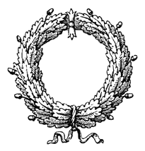 Corona civica (Bürgerkrone)